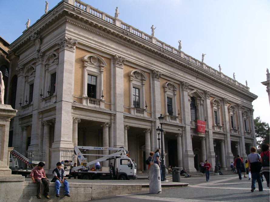 Palazzo Nuovo auf dem Kapitol in Rom